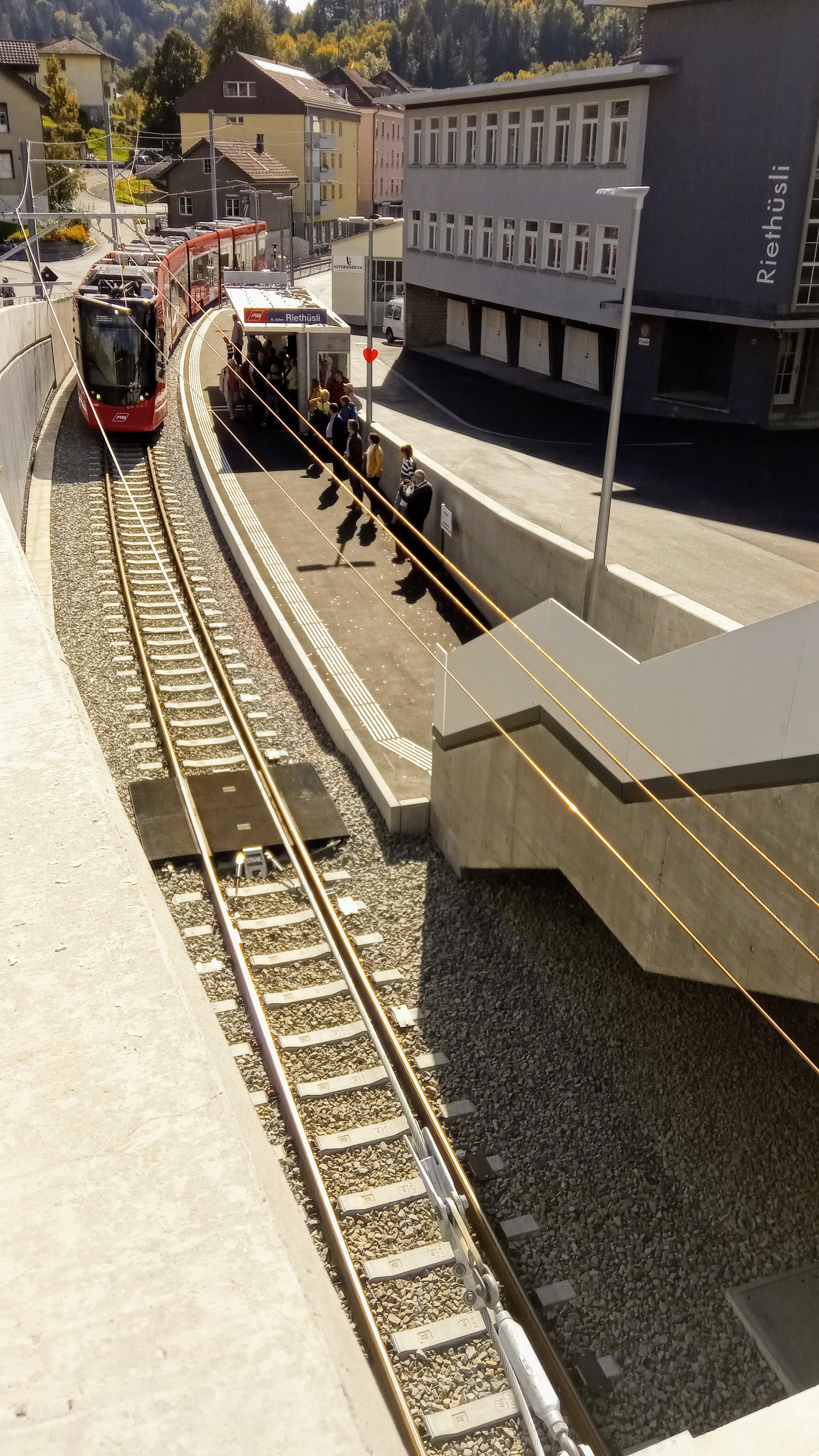 Blick vom Tunnelportal des Ruckhaldetunnels auf die Station Riethüsli der Appenzeller Bahnen. Es fährt aus Richtung Appenzell eine Stadler ABe 8/12 „Tango“-Komposition in dies Station ein.